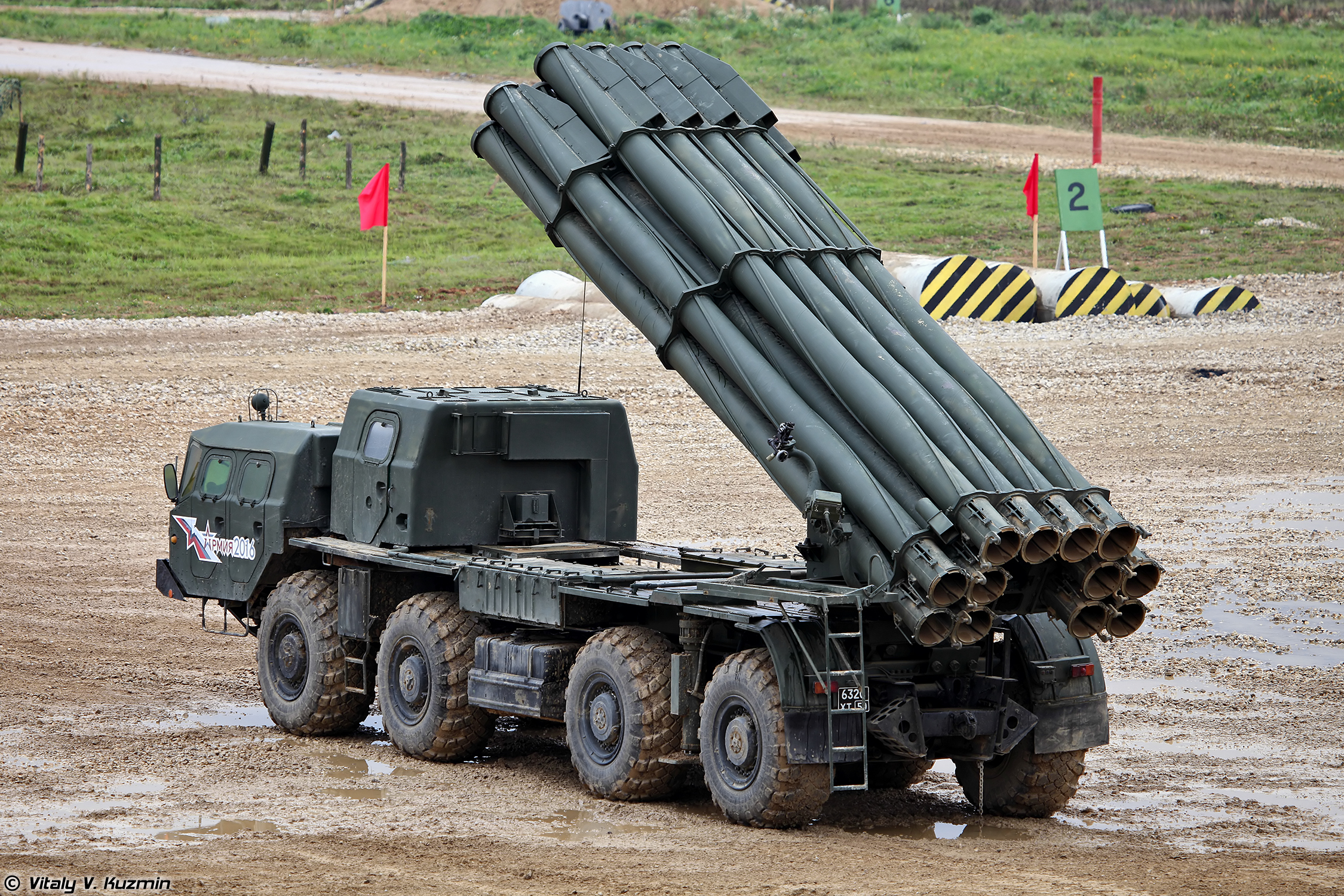 Боевая машина 9А52-2 РСЗО 9К58 Смерч (9A52-2 launch vehicle of 9K58 / BM-30 Smerch MLRS)